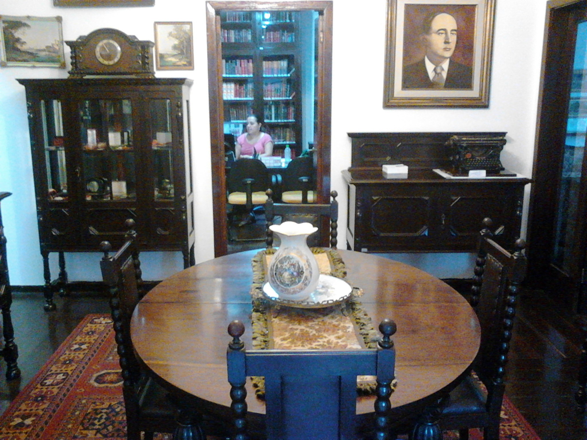 Ambiente interno do Centro Cultural e de Estudos Superiores Aúthos Pagano.